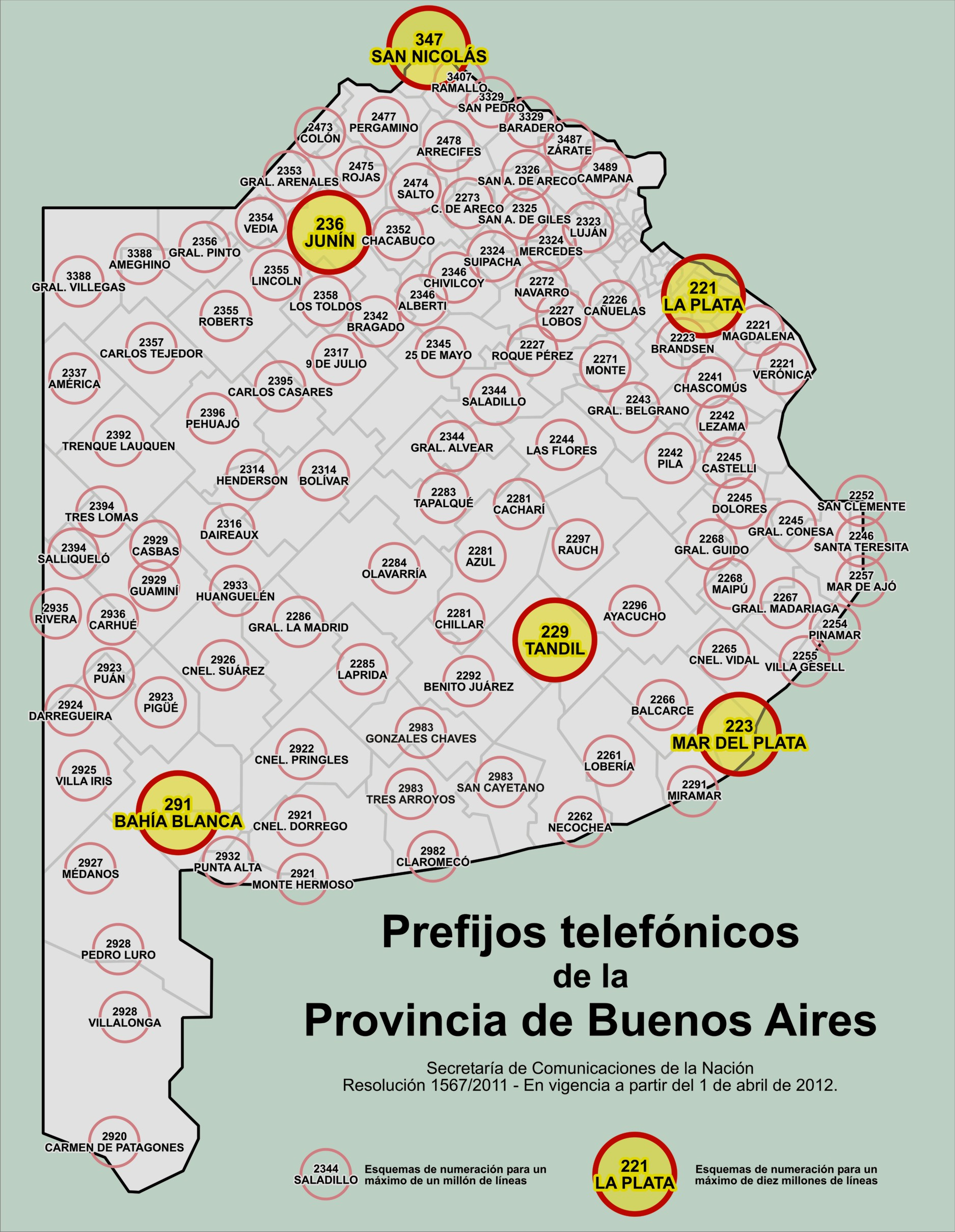 Prefijos telefónicos de ciudades de la provincia de Buenos Aires, en 2012.